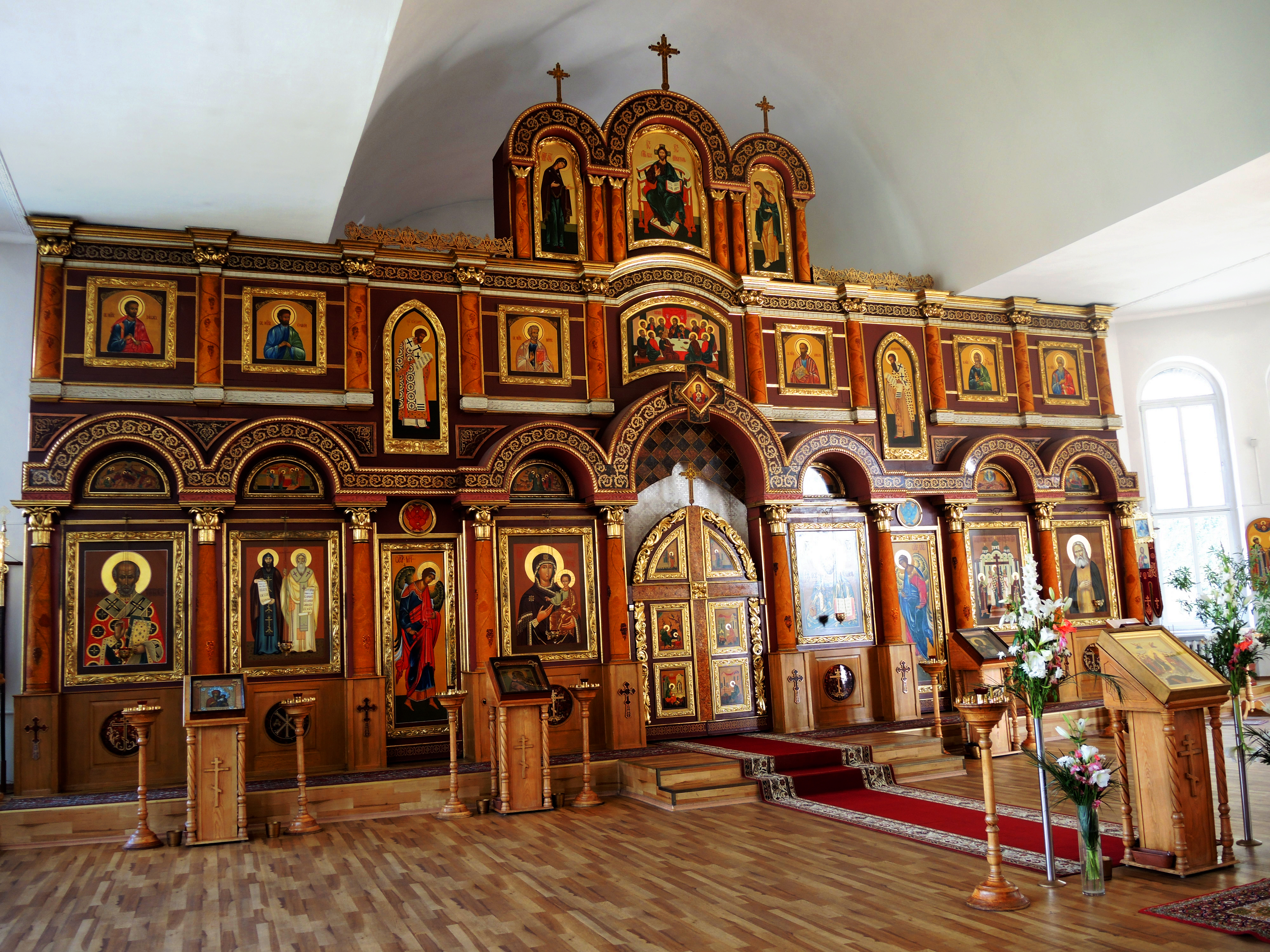 Кирха Св. Креста (Польский костел): улица Кузнечная, 8 / улица Генерала Павлова, 2, Калининград, Калининградская область